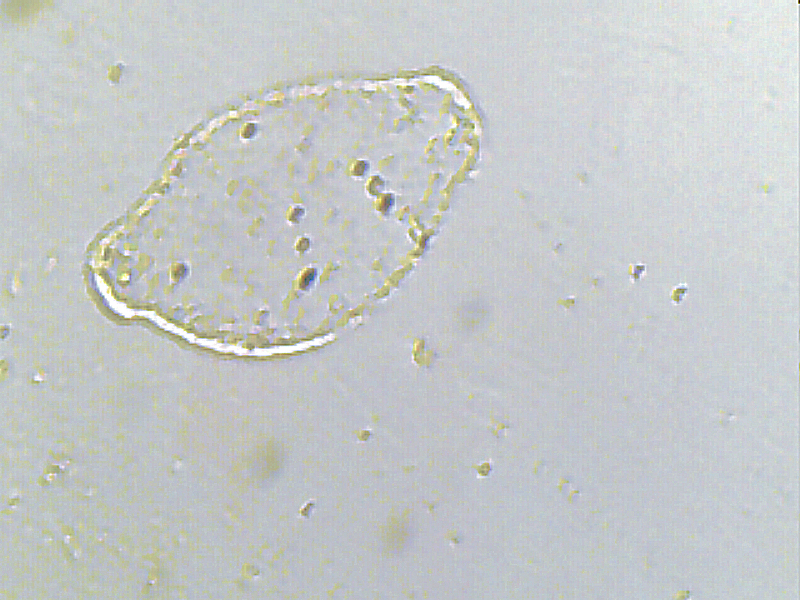 Meloidogyne chitwoodi-vrouwtje op Wortel Daucus carota 'Amsterdamse Bak' (maiswortelknobbelaaltje)